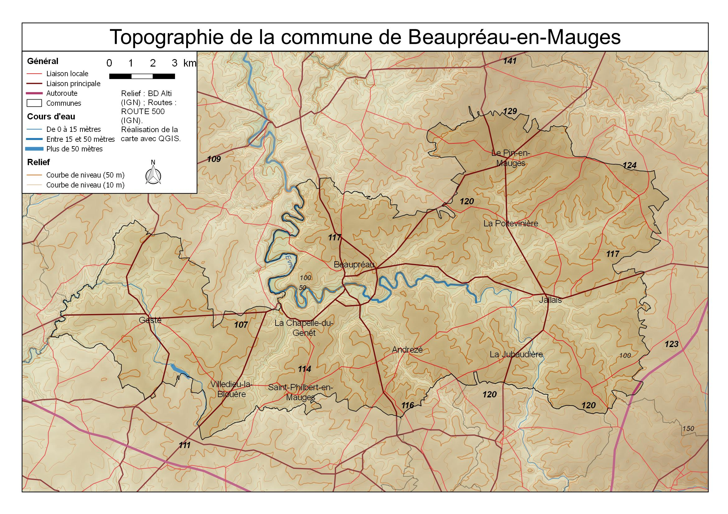 Carte topographique de la commune de Beaupréau-en-Mauges